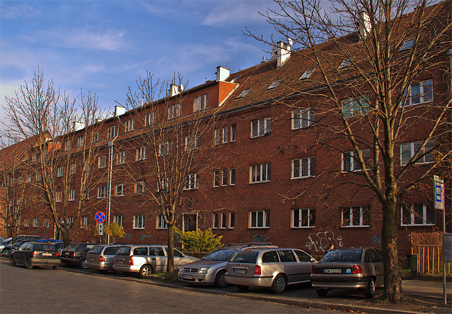 Dawny dom mieszkalny fundacji Schürtzmanna we Wrocławiu